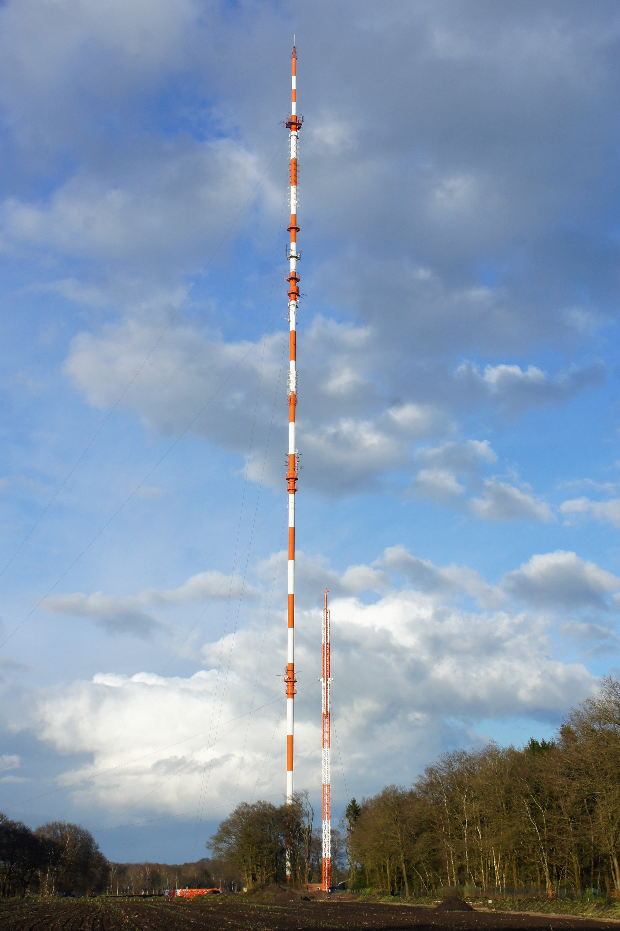 Baustelle neuer Gittermast neben dem alten NDR Sendemast